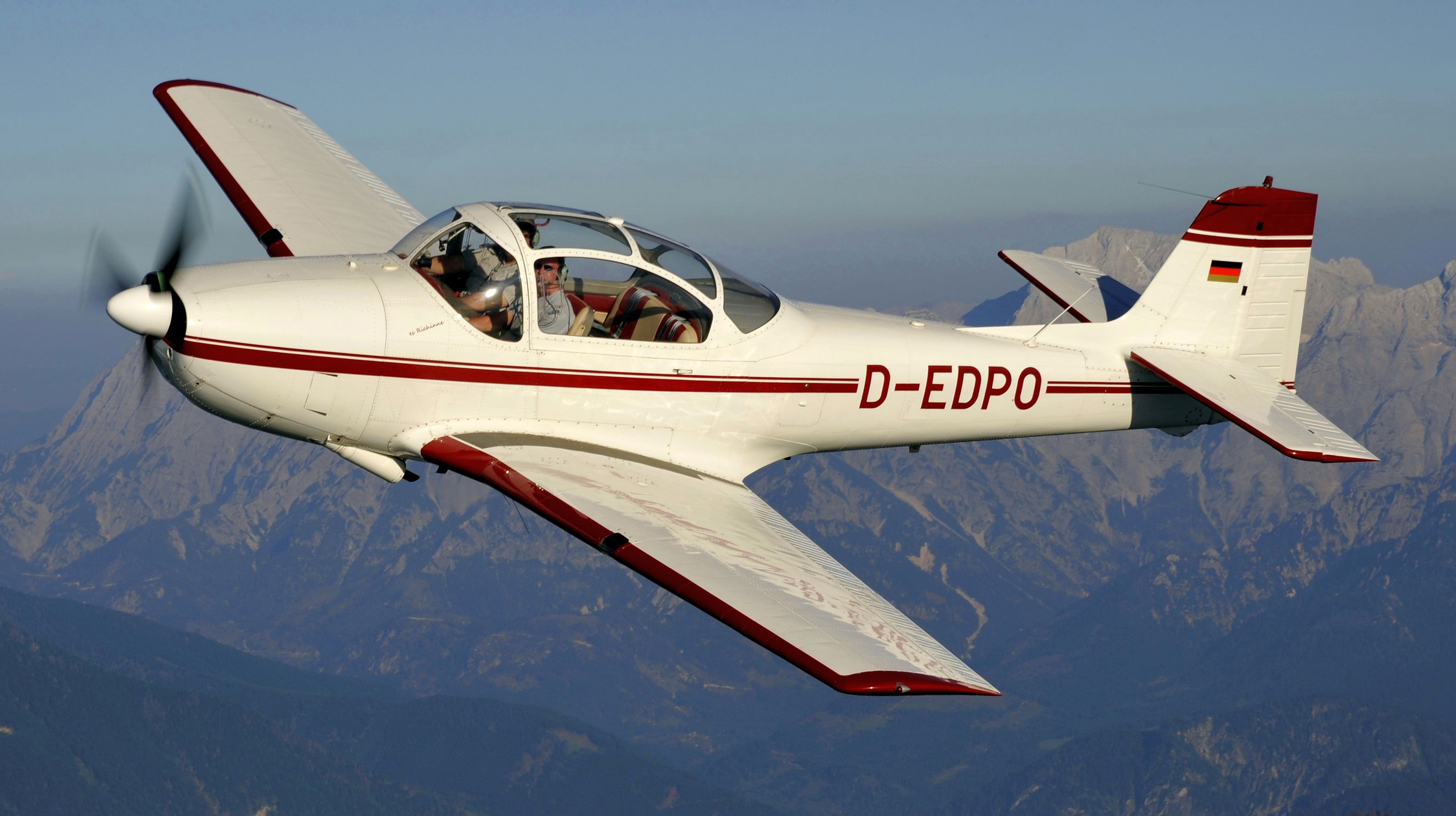 Piaggio P.149 im Flug (für ADT beschnitten)